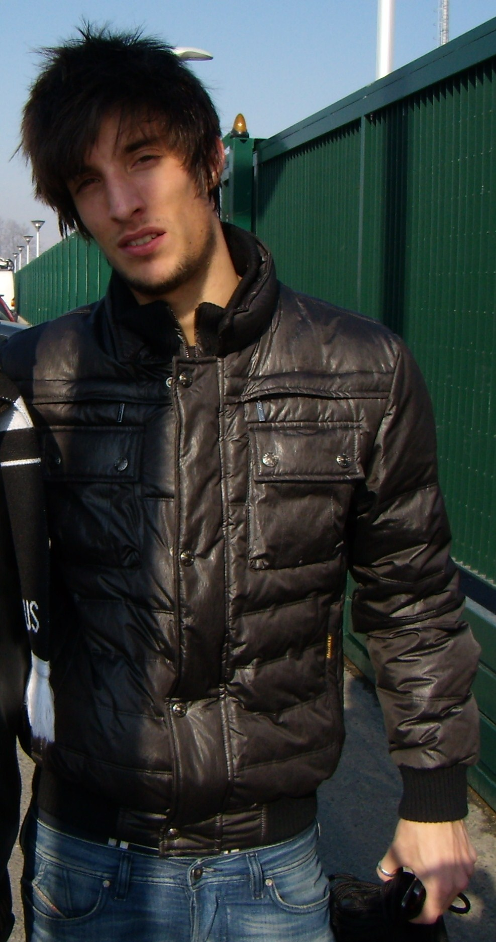 Opera propria